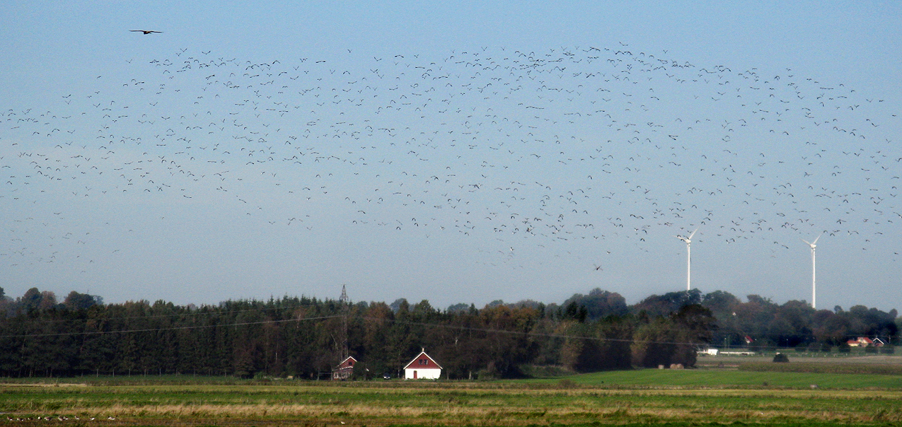 Tofsvipa (Vanellus vanellus) Ca 3000ex 29 sep 2011 vid Öja mosse Ystad.